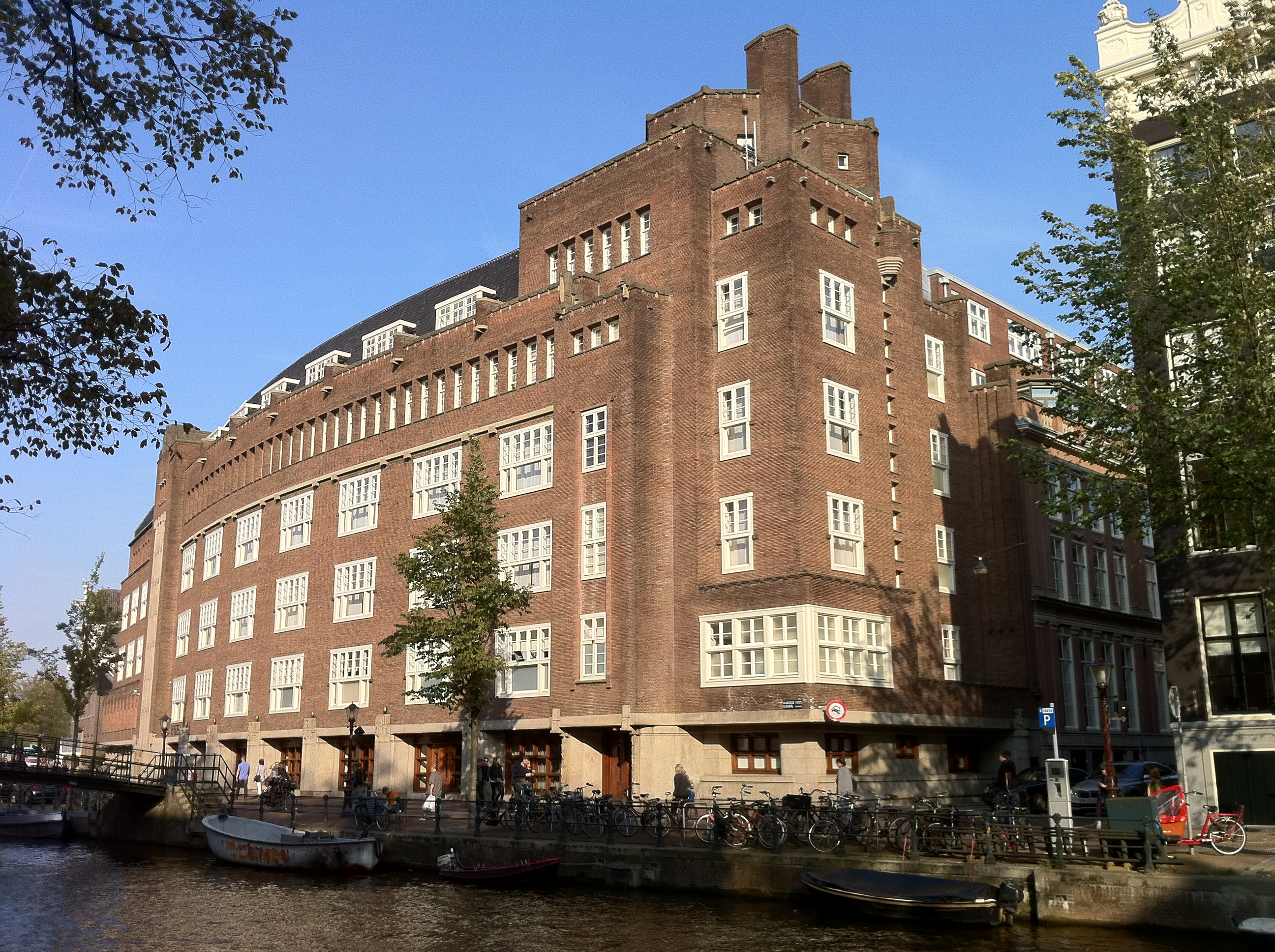 Aanbouw stadhuis Oudezijds Voorburgwal uit 1926